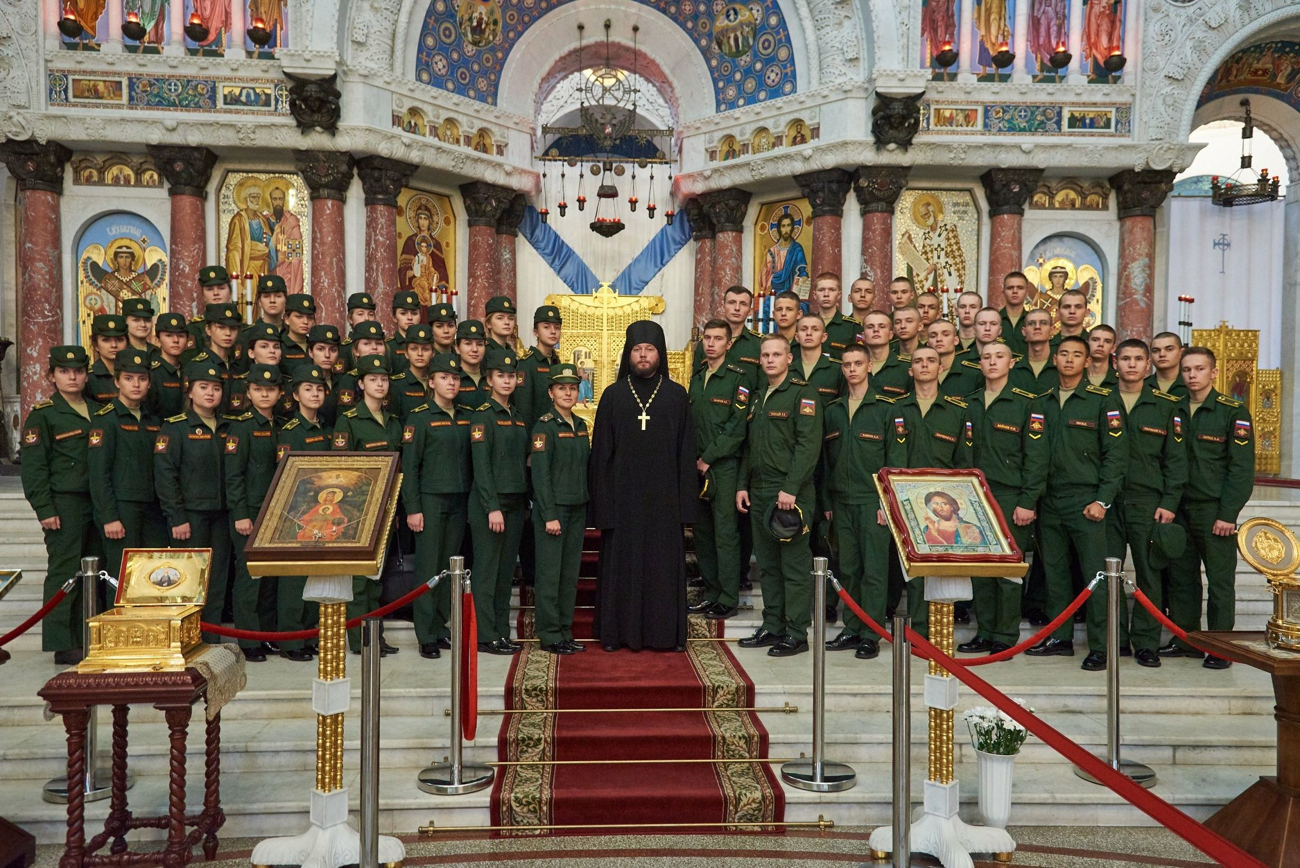 Иеромонах Леонид Маньков и курсанты Военной академии связи в Никольском Морском соборе Кронштадта.